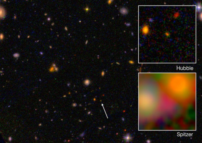 EGSY8p7 (Hubble e Spitzer)